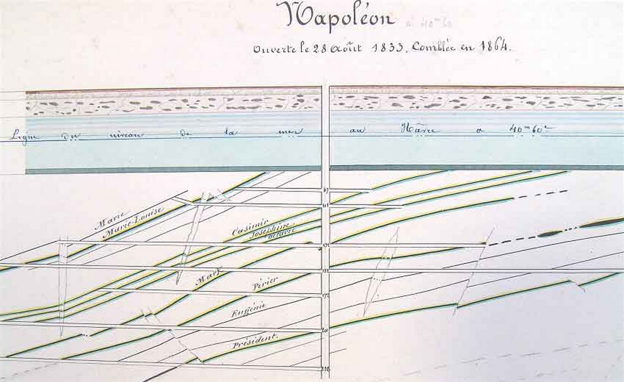 La fosse Napoléon de la Compagnie des mines d'Anzin était un charbonnage constitué d'un seul puits situé à Denain, Nord, Nord-Pas-de-Calais, France.